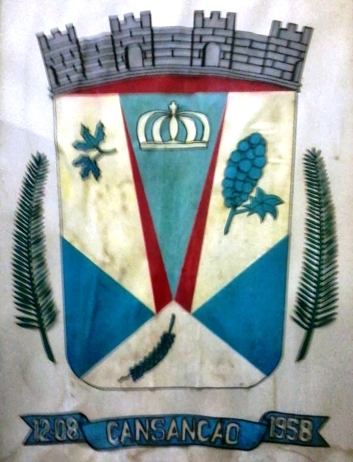 Brasão do Município de Cansanção, Estado da Bahia, Brasil.